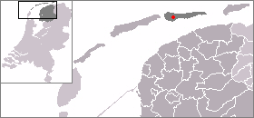 Locatie van Ballum, zelf gemaakt uit sjabloon van Wikipedia-gebruiker Mtcv